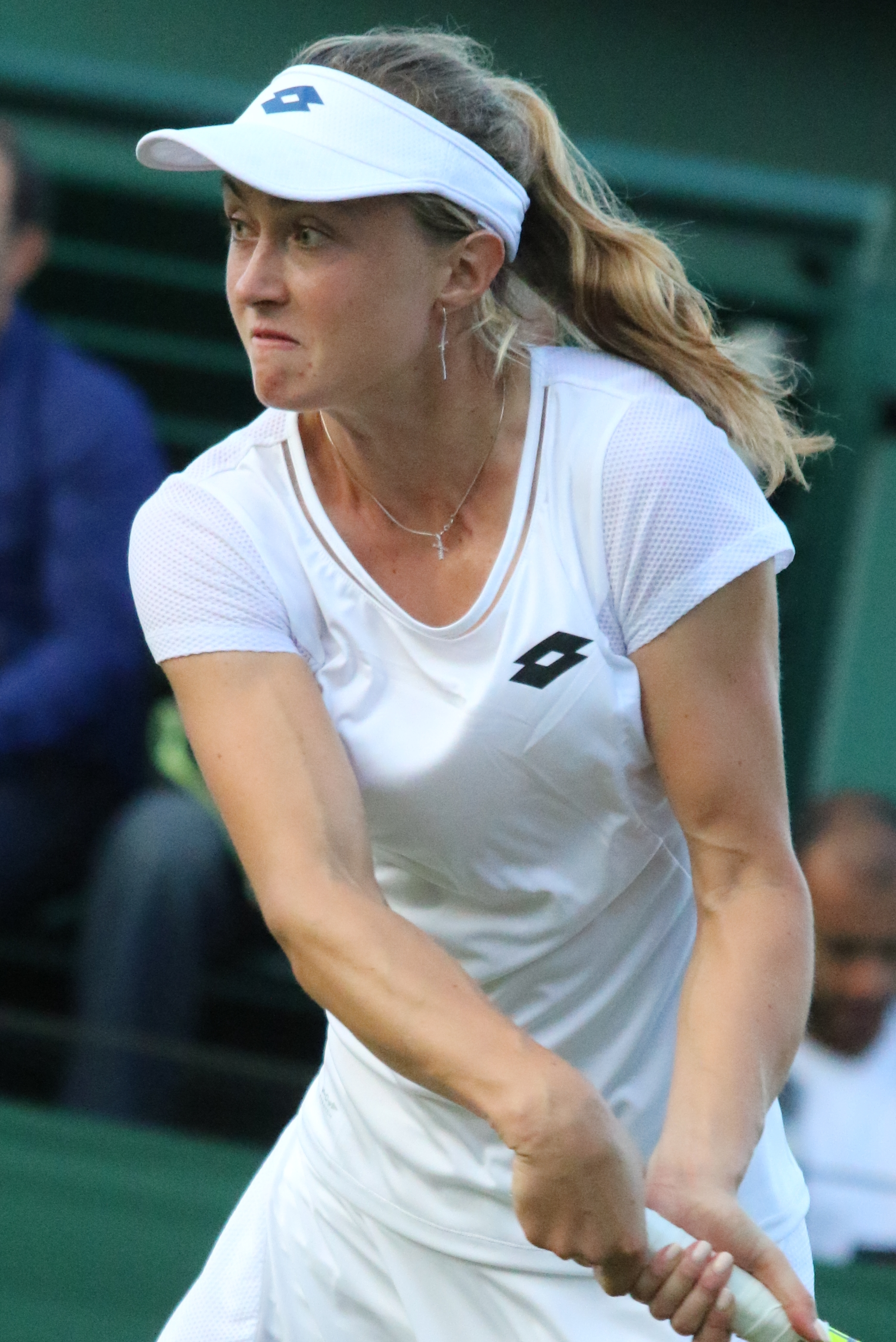 Sasnovich WM17 (4)